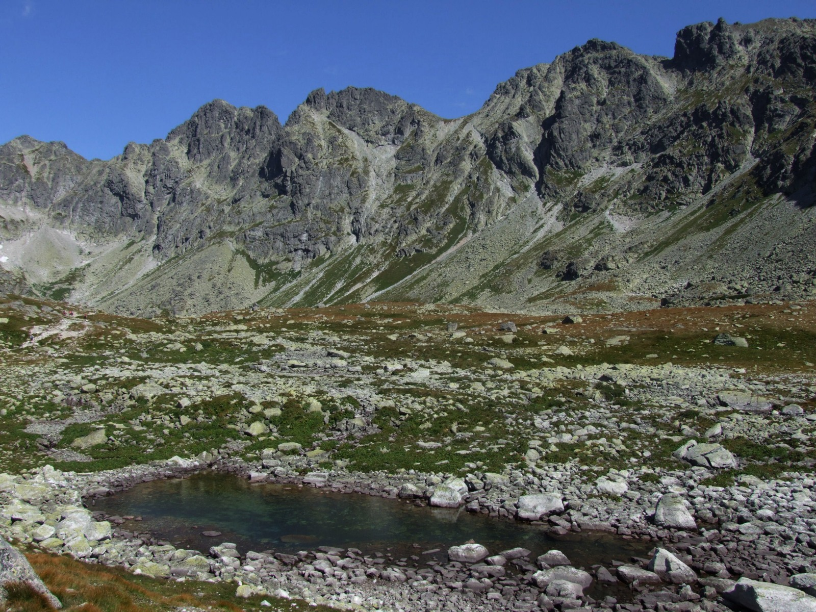 Hińczowe Stawki (Dolina Mięguszowiecka)